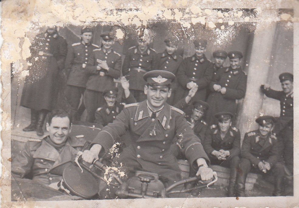 Богдан Йорданов Илиев